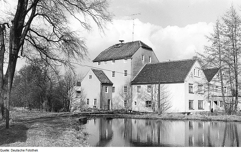 Original image description from the Deutsche Fotothek Ralbitz-Rosenthal-Cunnewitz. Ehem. Wassermühle, Ansicht über den Teich